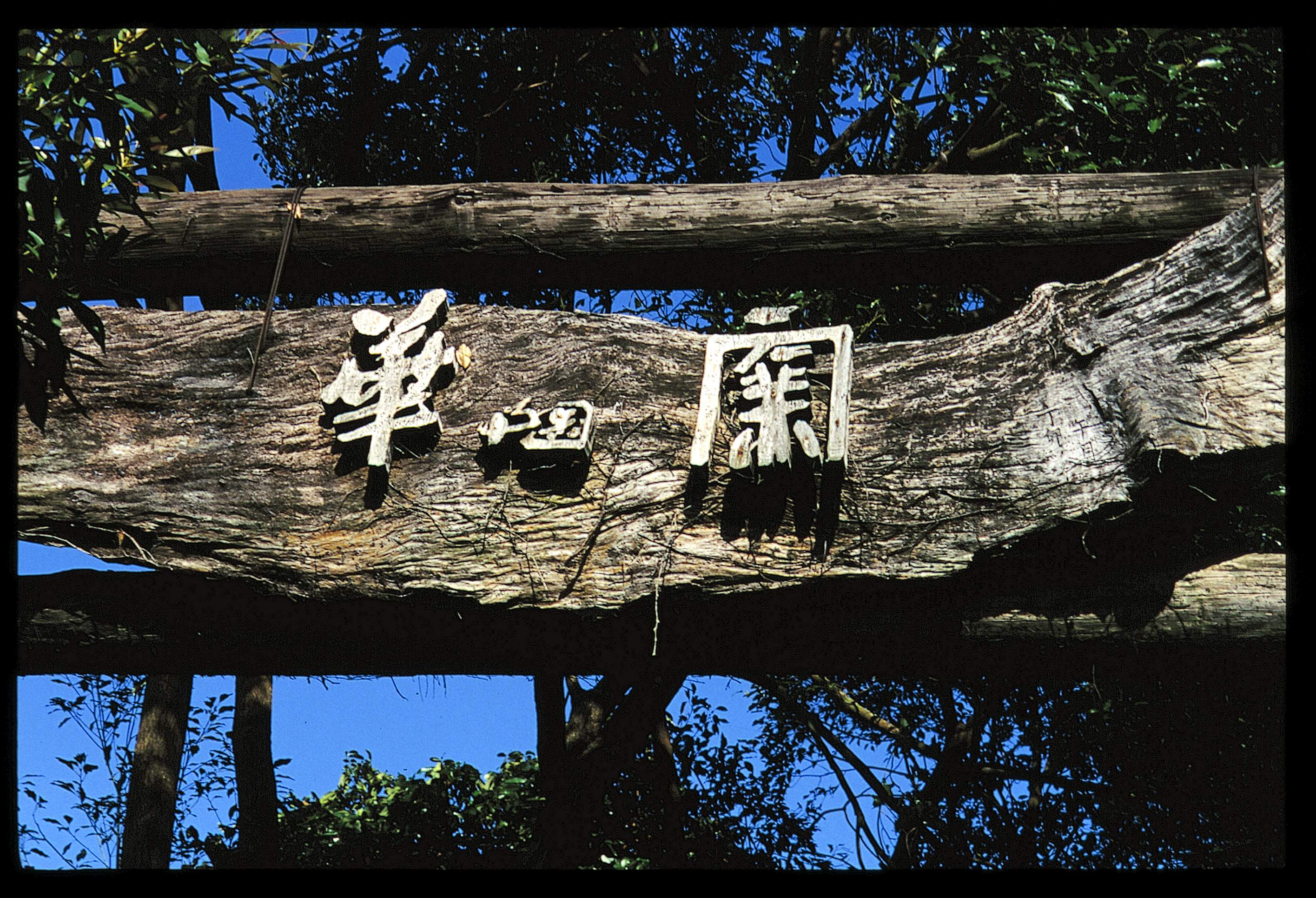 華陶窯漂流木牌